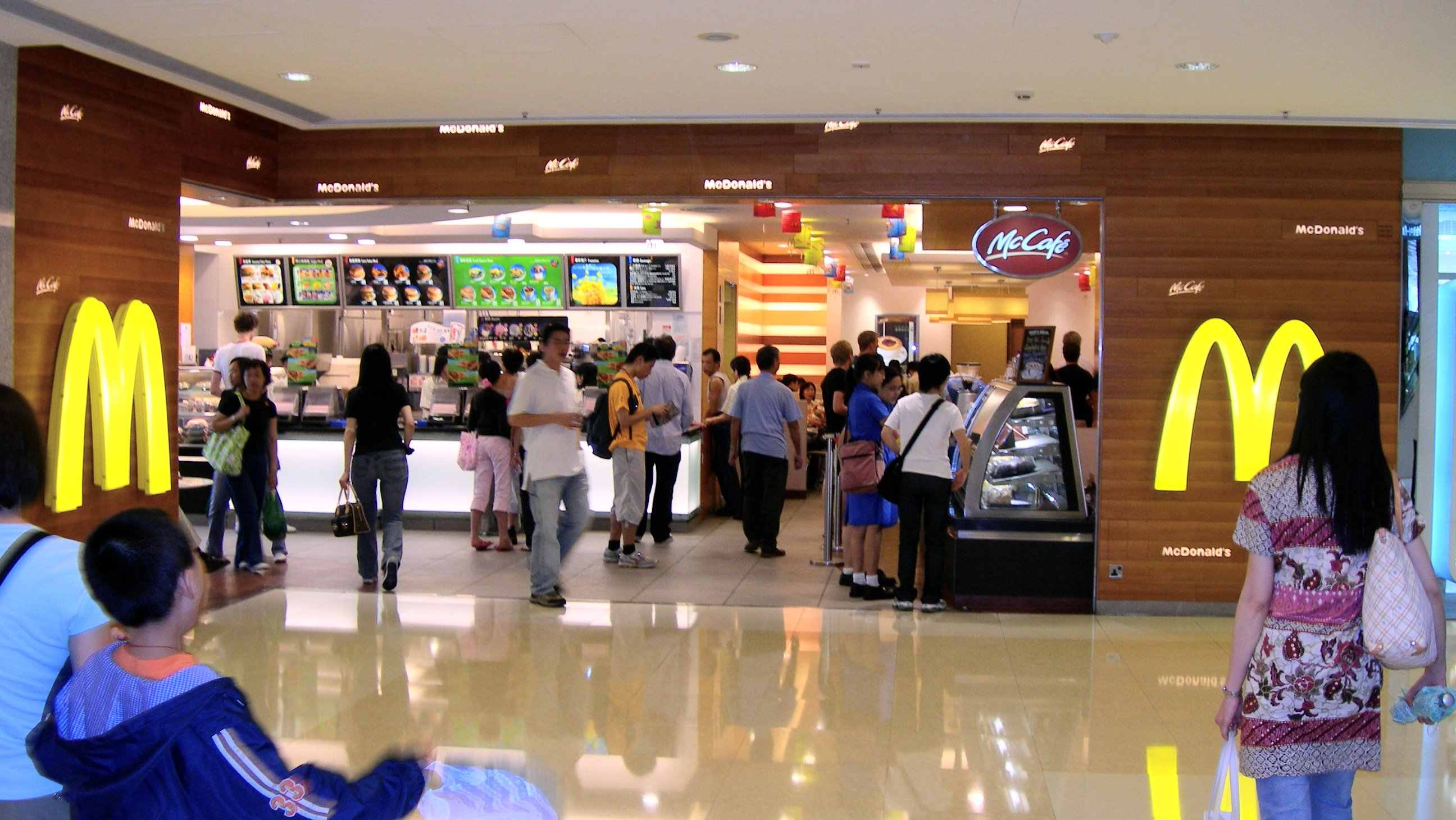 A McDonald's in IFC Mall, Hong Kong